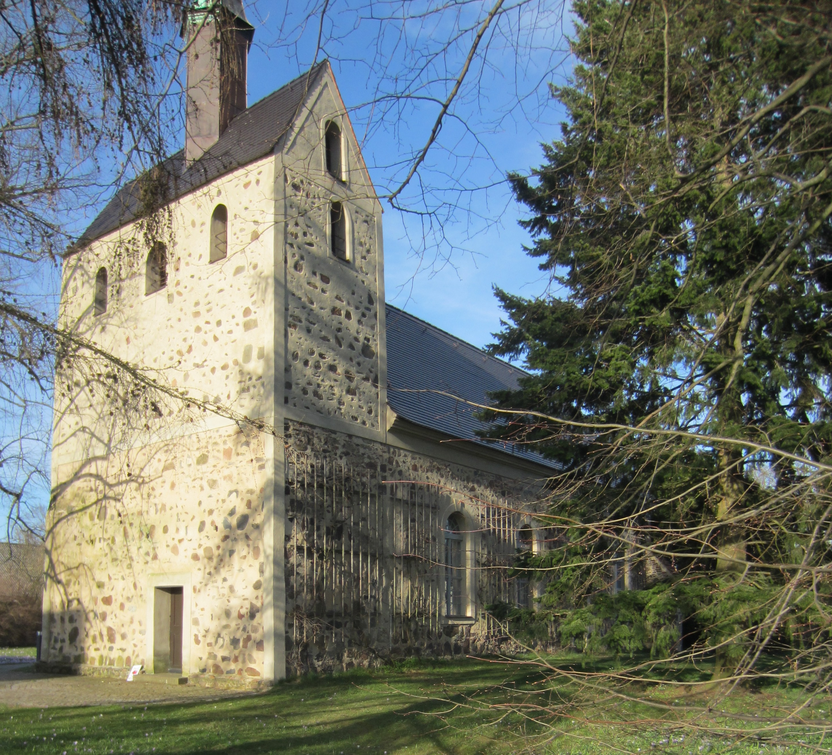 Langengrassau, Gemeinde Heideblick, denkmalgeschützte Dorfkirche, Ansicht von Südwesten